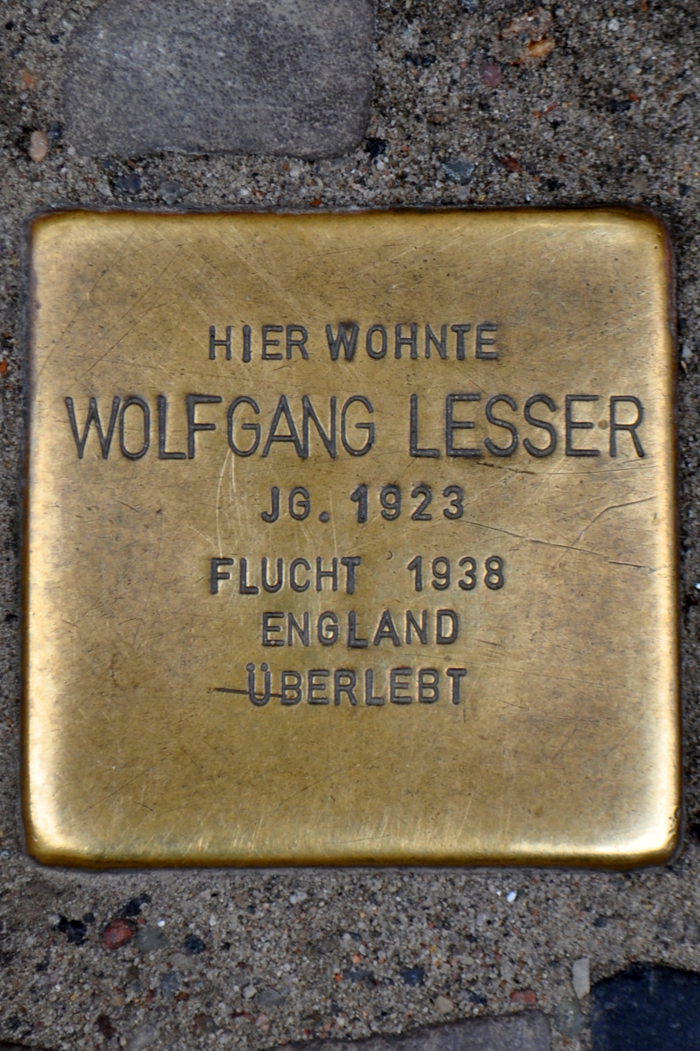 Stolperstein in Stralsund, Ossenreyerstraße 21/22. Der Stolperstein ist einer von fünf Stolpersteinen an dieser Adresse. Text: Hier wohnte Wolfgang Lesser Jg. 1923 Flucht 1938 England überlebt